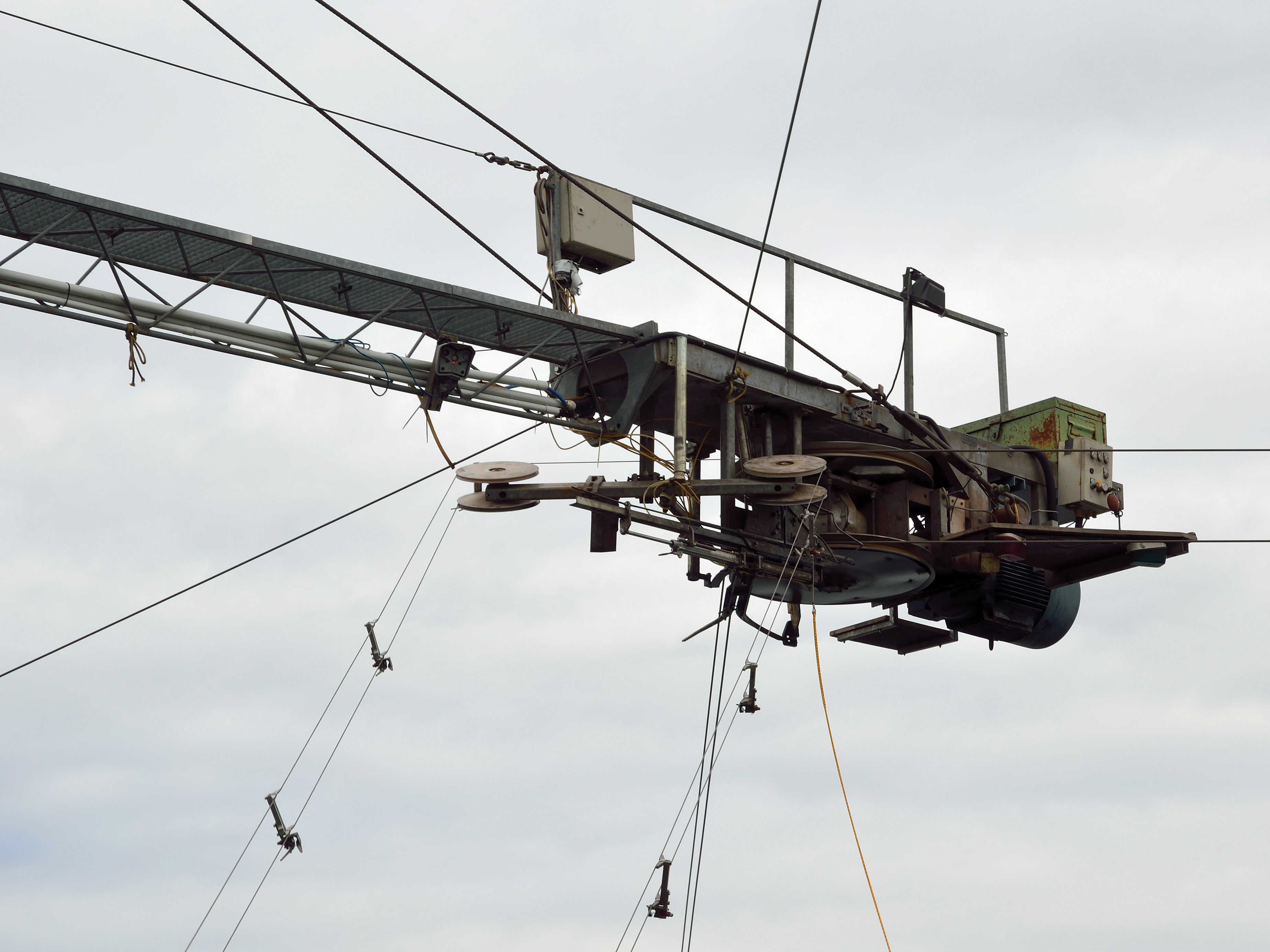 Wakeboard-Zuganlage im Seepark Niederweimar